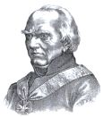 Poland, IV L.O. w Sosnowcu - zdjęcie